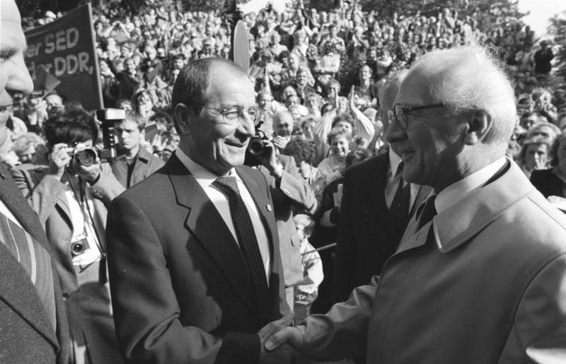 ADN-ZB/Settnik/3.10.87/Dresden: X. Kunstausstellung der DDR Zur Eröffnung der Kunstausstellung im Dresdner Albertinum hieß der Präsident des Verbandes Bildender Künstler der DDR, Prof. Willi Sitte, den Generalsekretär des ZK der SED und Vorsitzenden des Staatsrates der DDR, Erich Honecker, herzlich willkommen. Viele Dresdner Einwohner waren zur Begrüßung Erich Honeckers und seiner Begleitung erschienen.